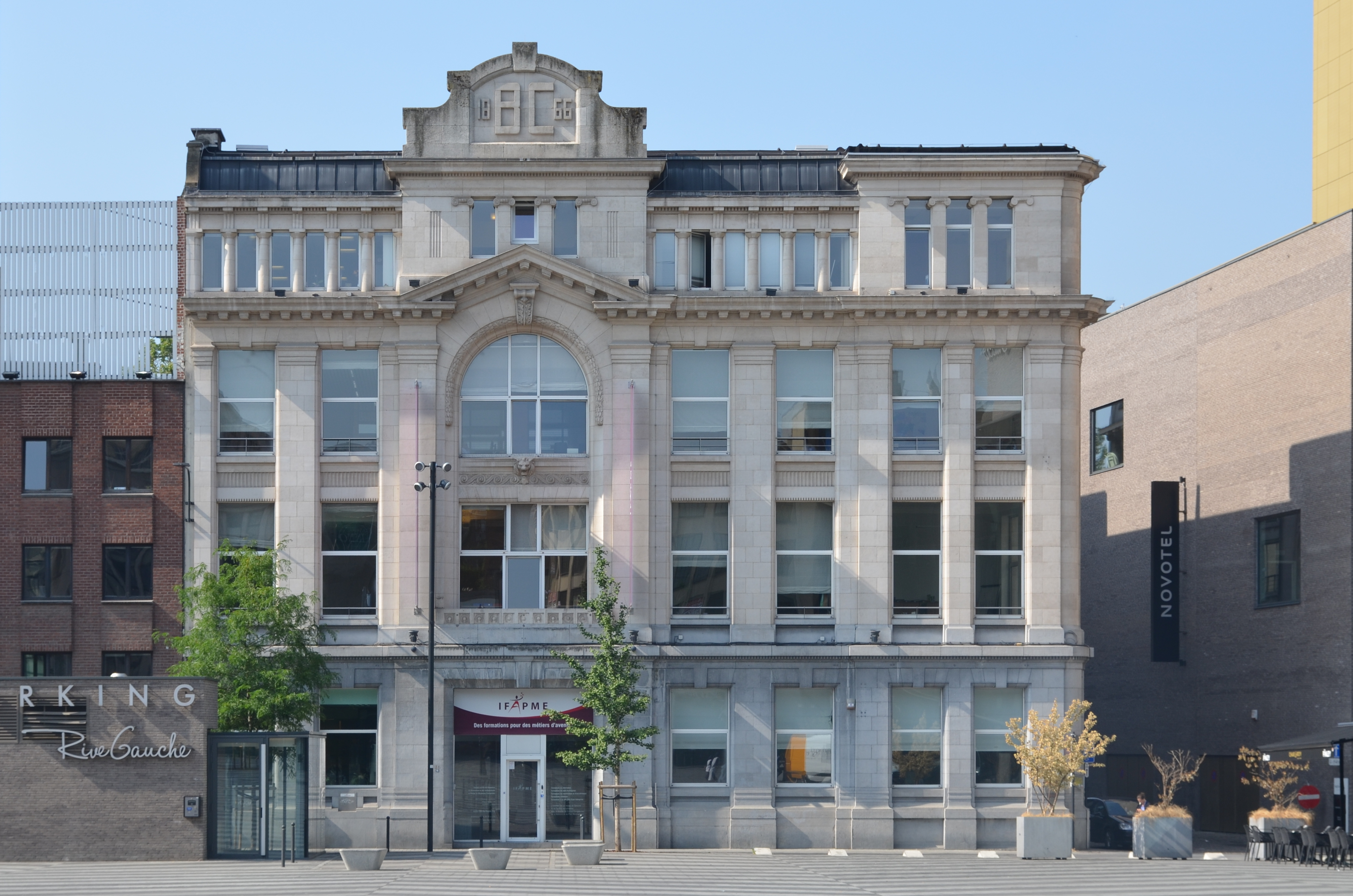 Charleroi (Belgique) - Banque de Charleroi, fondée en1866. Immeuble construit en 1920 par Émile Devreux, architecte et bourgmestre de la ville. Actuellement le siège de l'Institut wallon de formation en alternance et des indépendants et des petites et moyennes entreprises (IFAPME).